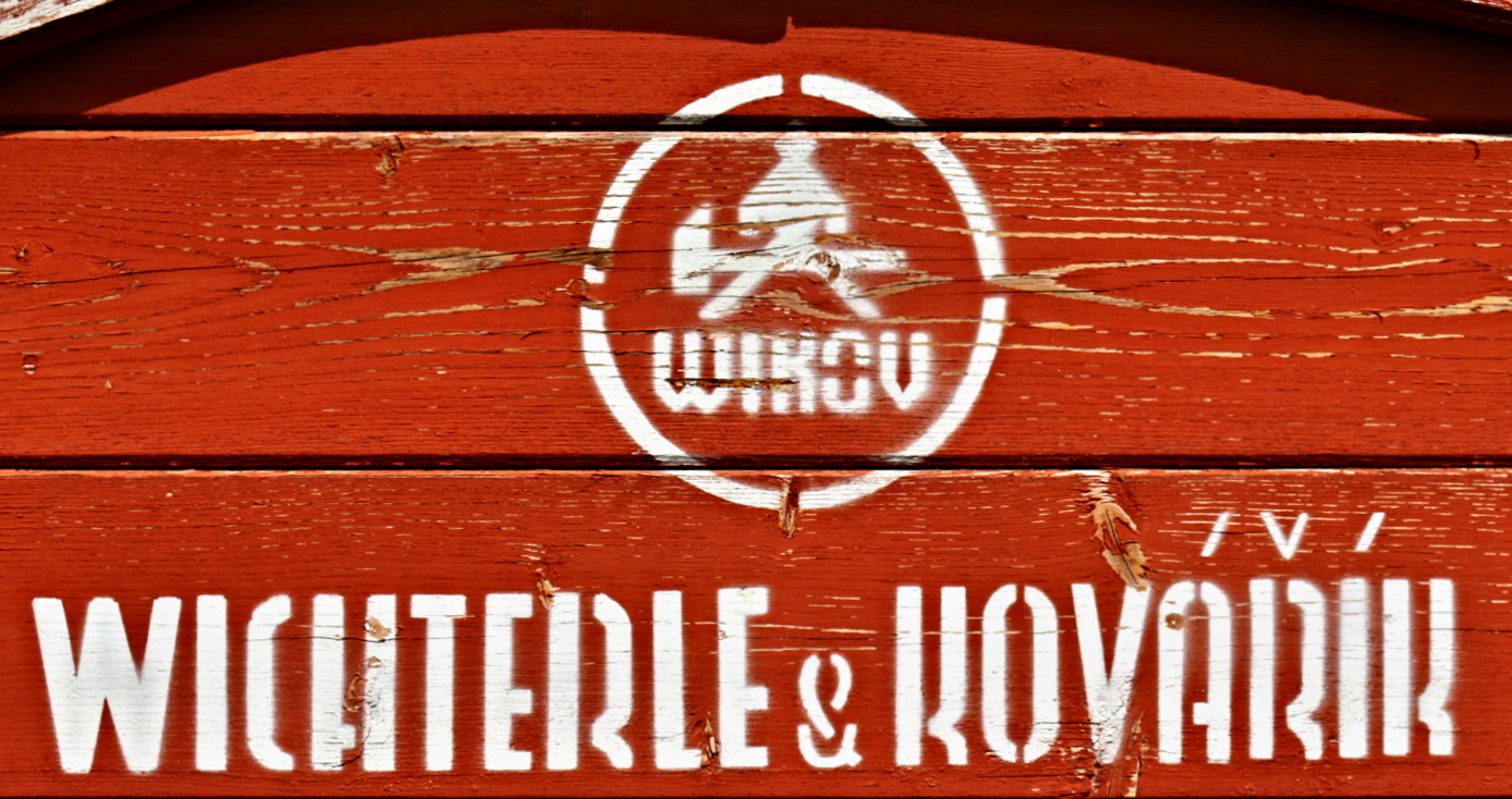 Wikov logo